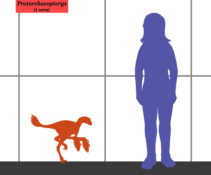 Протархеоптерикс (Protarchaeopteryx) в сравнении с человеком.